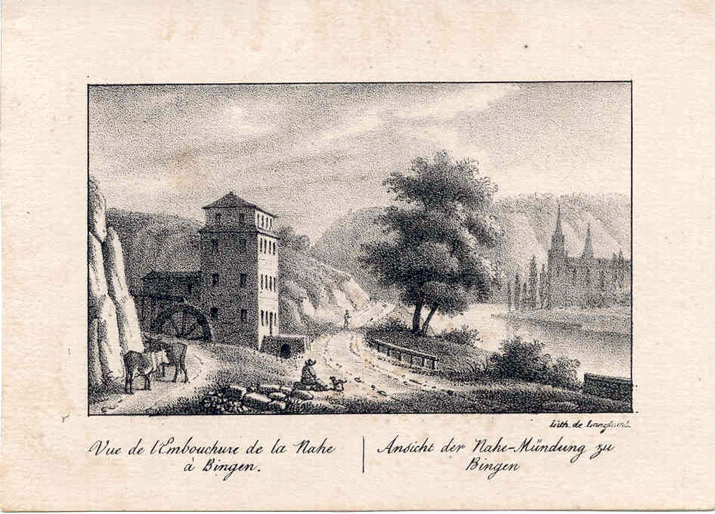 Eulersches Haus in der gemeinde Rupertsberg (jetzt Bingerbrück)